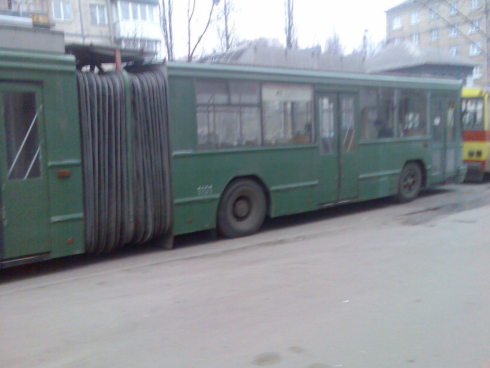 Троллейбус «К-12.03» (№1101) 42-го маршрута на улице Вадима Гетьмана в Киеве. На заднем плане «Шкода-14тр» (№379) 22-го маршрута.